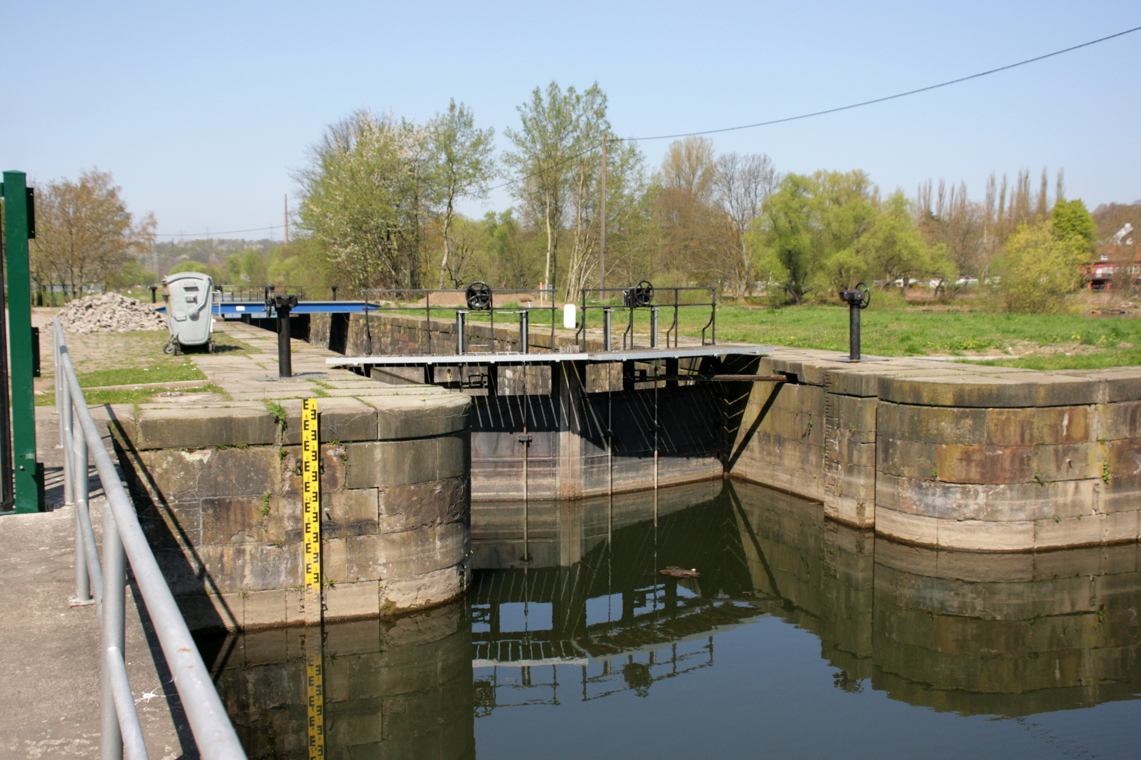 Schleuse Dahlhausen der Ruhr in Hattingen, nahe Bochum-Dahlhausen